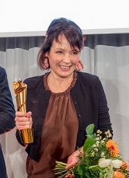 Anke Sevenich, Deutscher Drehbuchpreis 2016